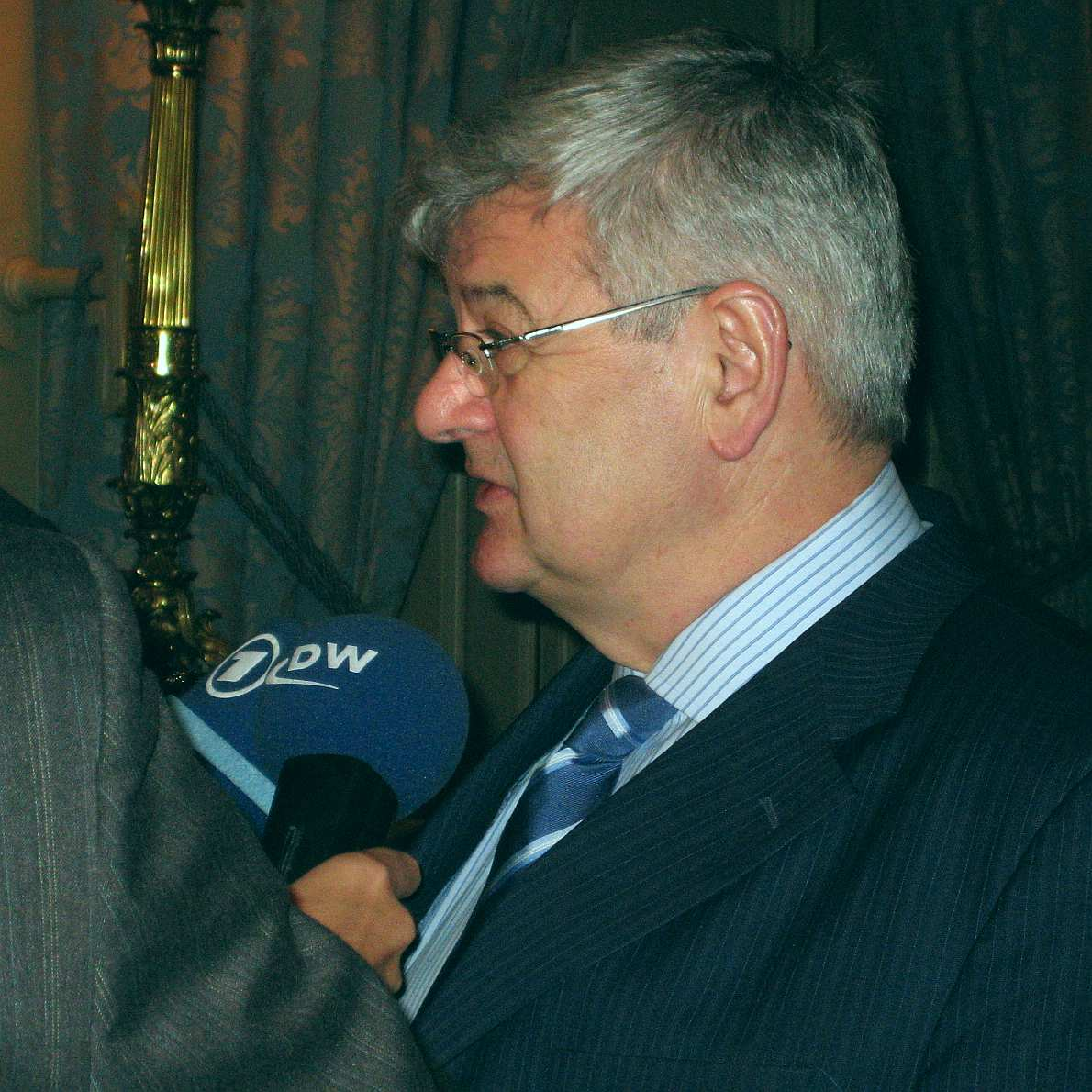 De Joschka Fischer, am Dezember 2007